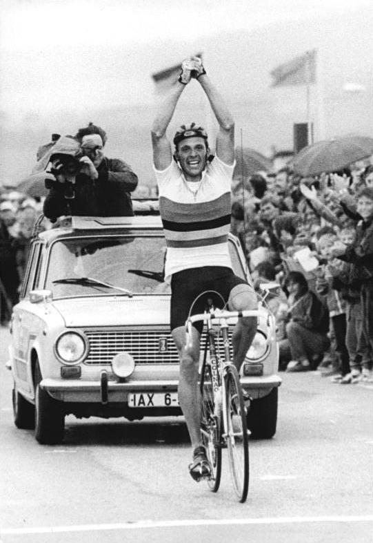 Uwe Ampler ADN-ZB Thiese-25.7.87-tre: Hohenstein-Ernstthal-Weltmeister Ampler DDR-Meister - Weltmeister und Friedenfahrtsieger Uwe Ampler (SC DHfK Leipzig) wurde auf dem traditionsreichen Sachsenring nach spannendem Rennverlauf mit 22 Sekunden Vorsprung neuer DDR-Straßenmeister.